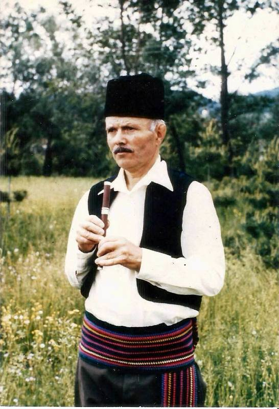 Foglrafija je moj delo koje sam uradio, tj. fografisoa svoga učitelja 7. jula 1984 godine